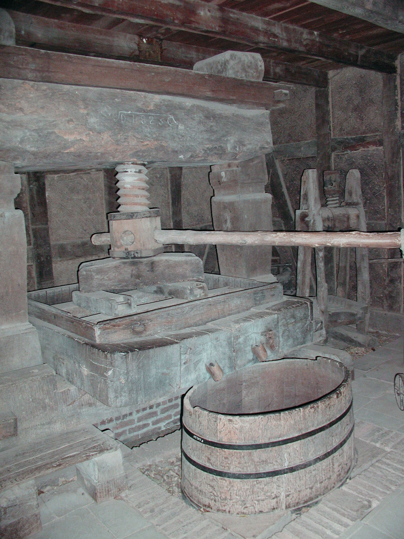 Rheinisches Freilichtmuseum Kommern